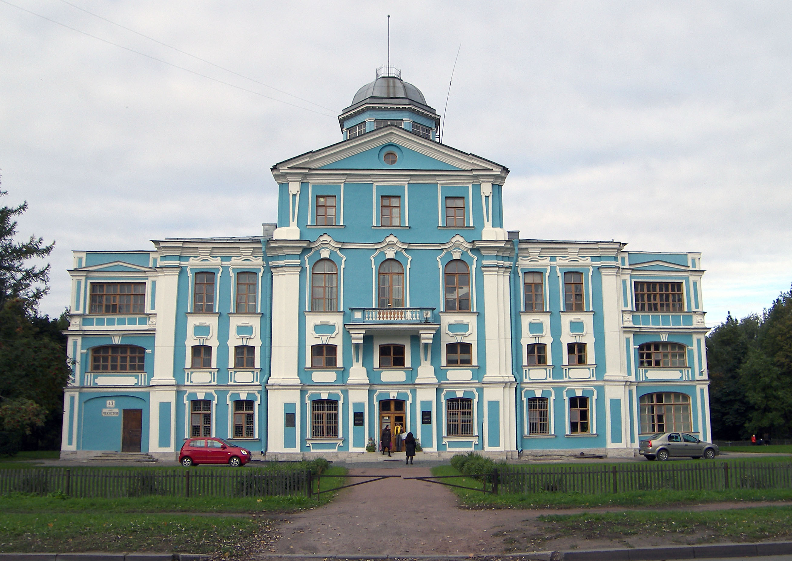 Дача Воронцова «Новознаменка». 18 в., 1750-е гг., арх. Ринальди А., 1829—1830 гг., 1957—1960 гг. (восстановление), арх. Плотников М. М.